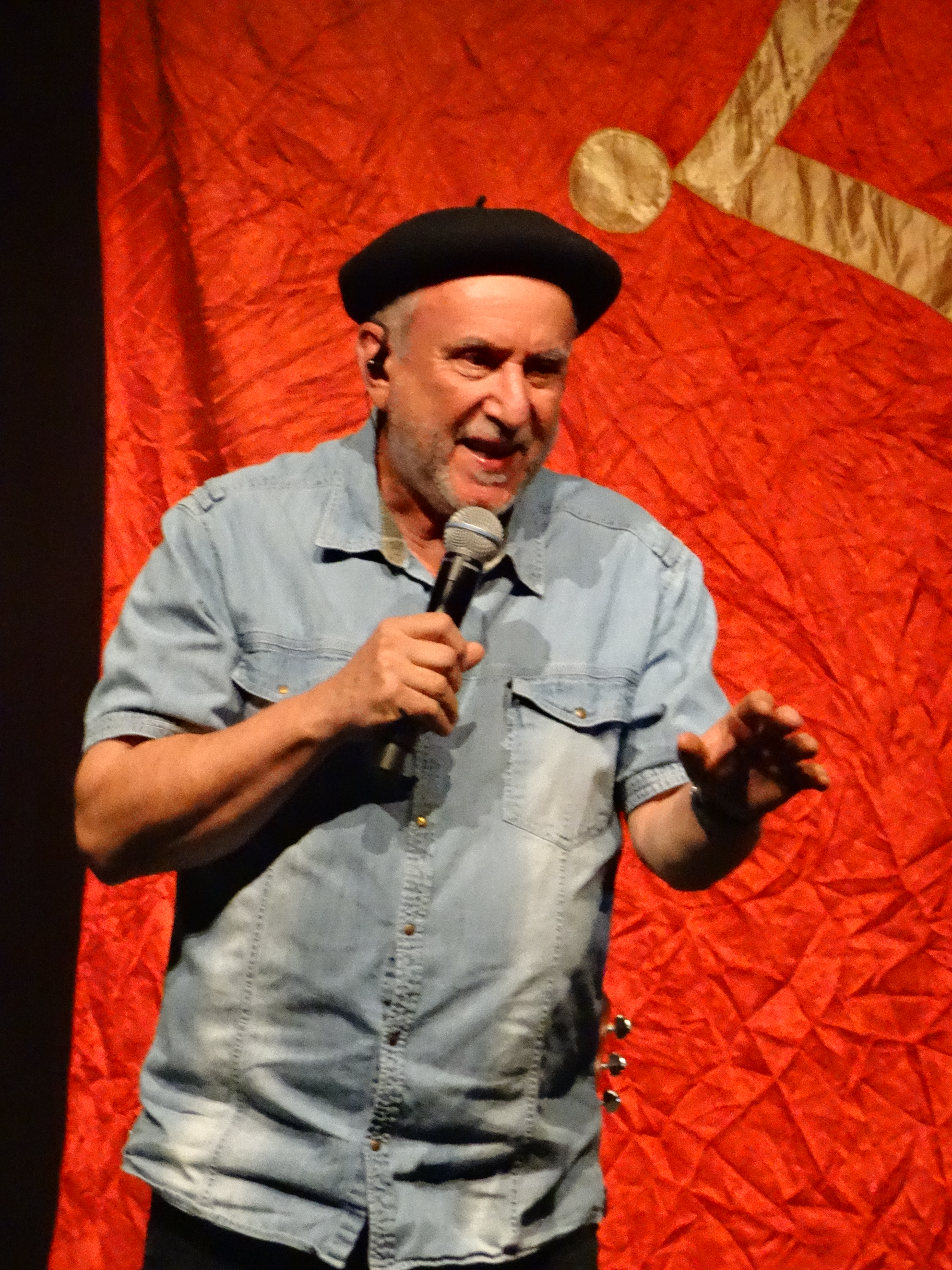 Jan, chanteur du groupe Nadau